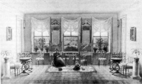 Гостиная в имении Горки (Яньковские).